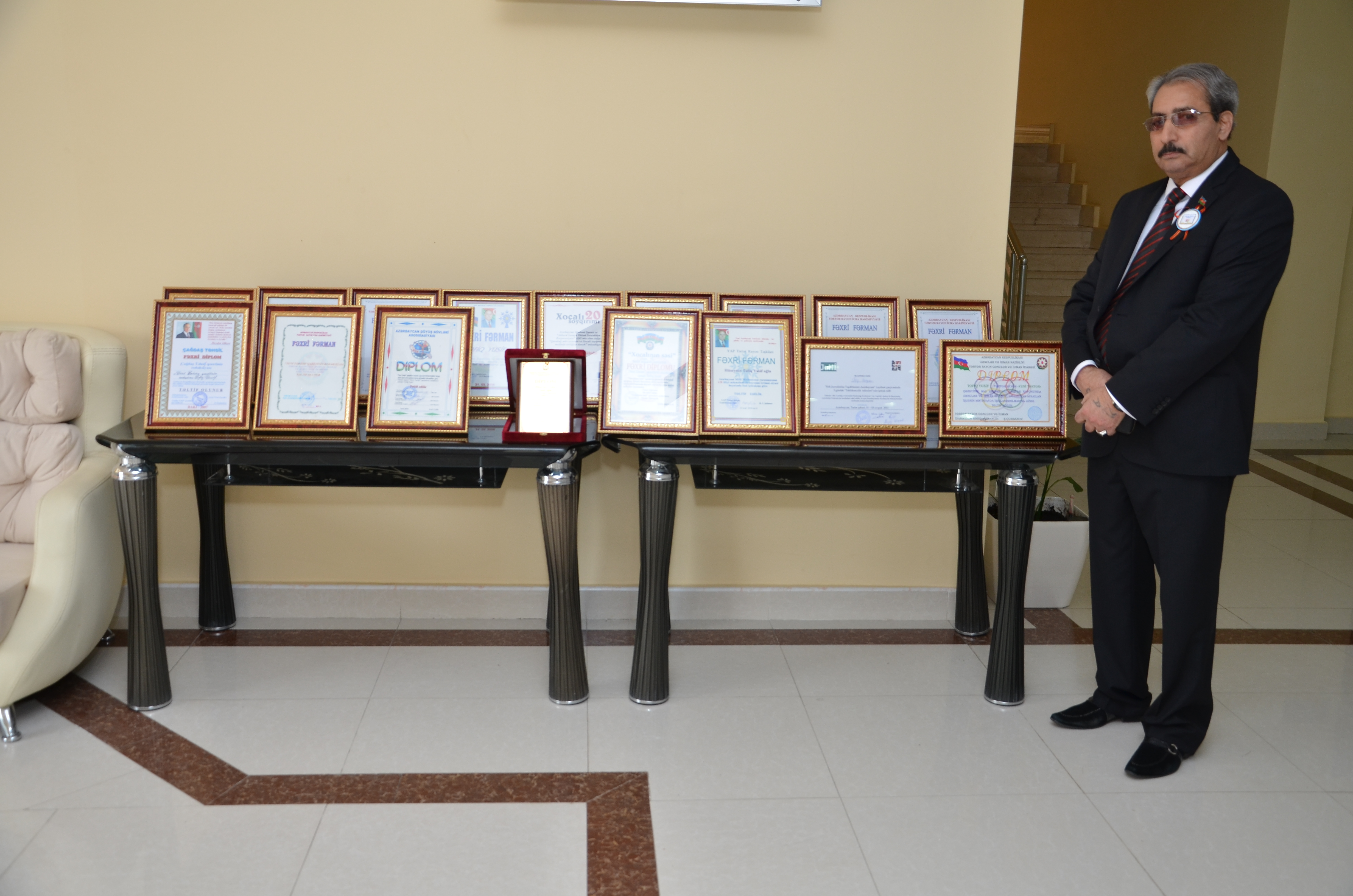 Tofiq Yusif